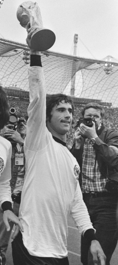 Gerd Müller levantando la Copa del Mundo de la FIFA tras ganar la final del Mundial de 1974 frente a Países Bajos.